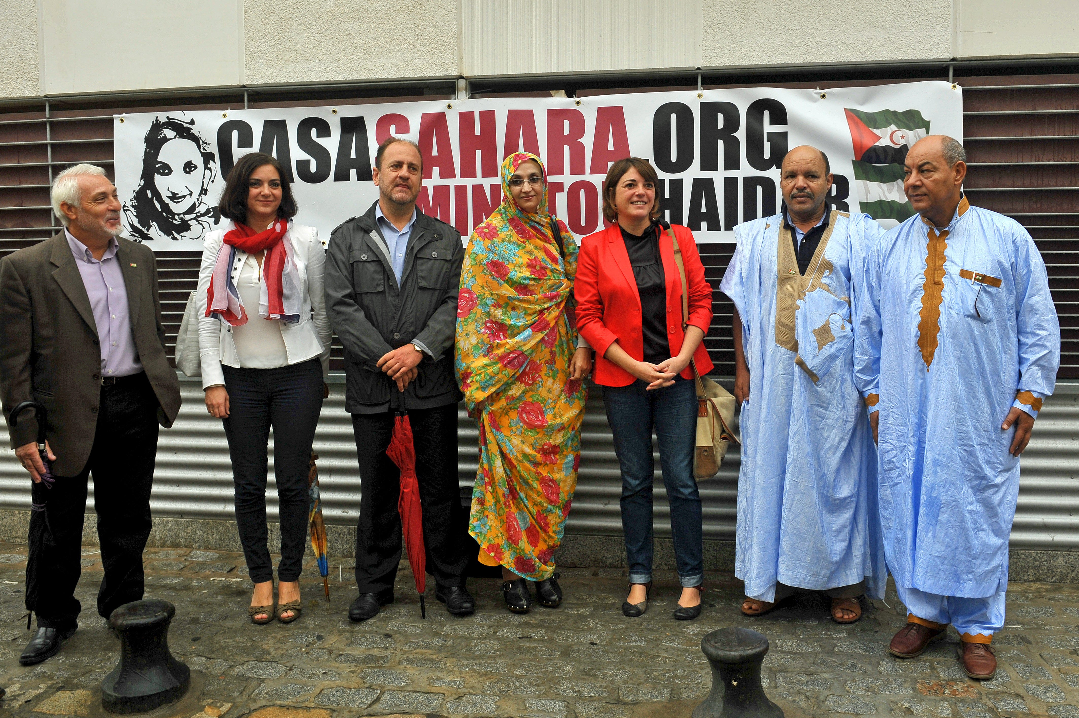 13.10.25-Local-1-Pueblo Saharaui